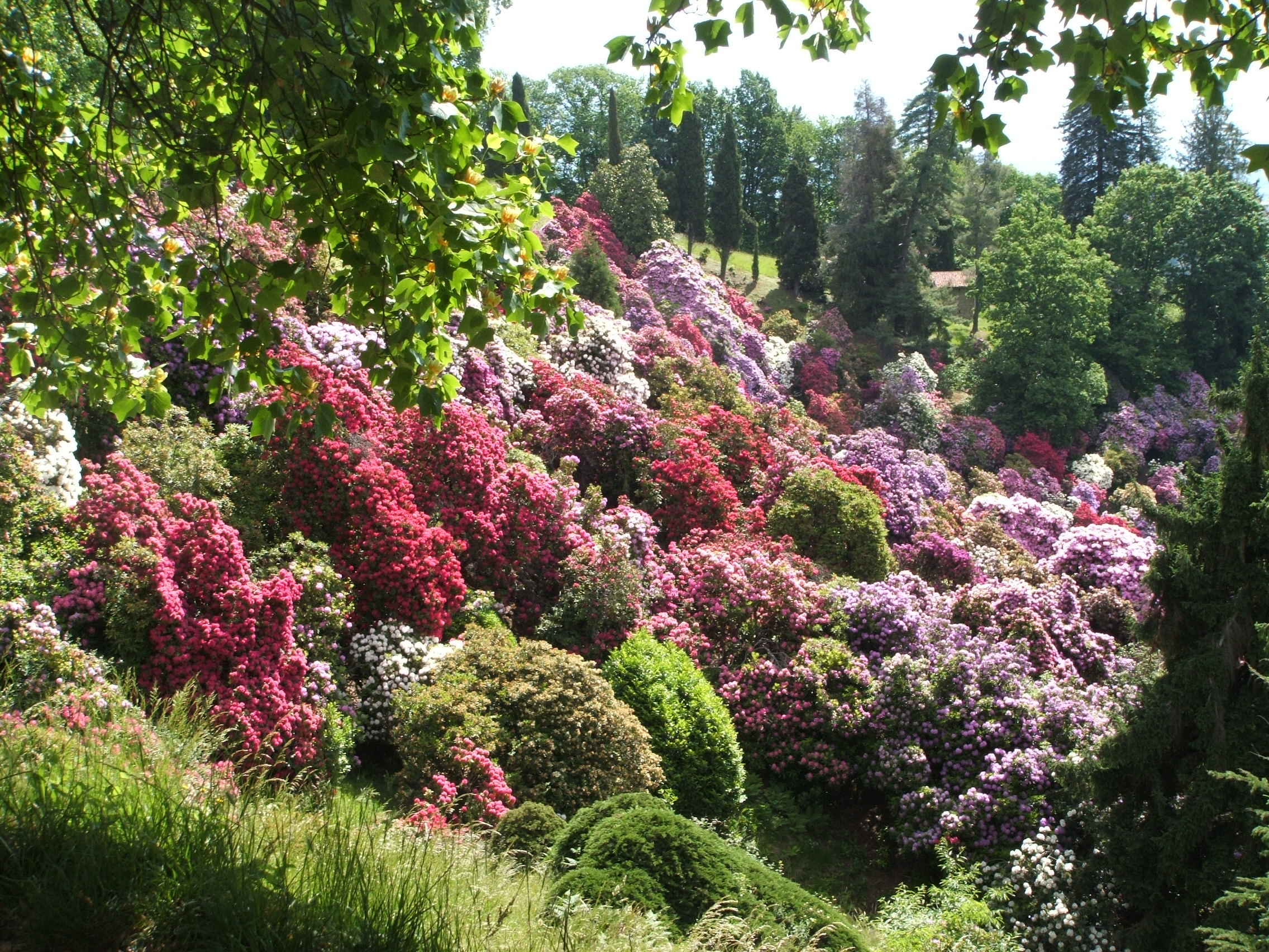 Parco della Burcina, Biella, Piemonte, Italia